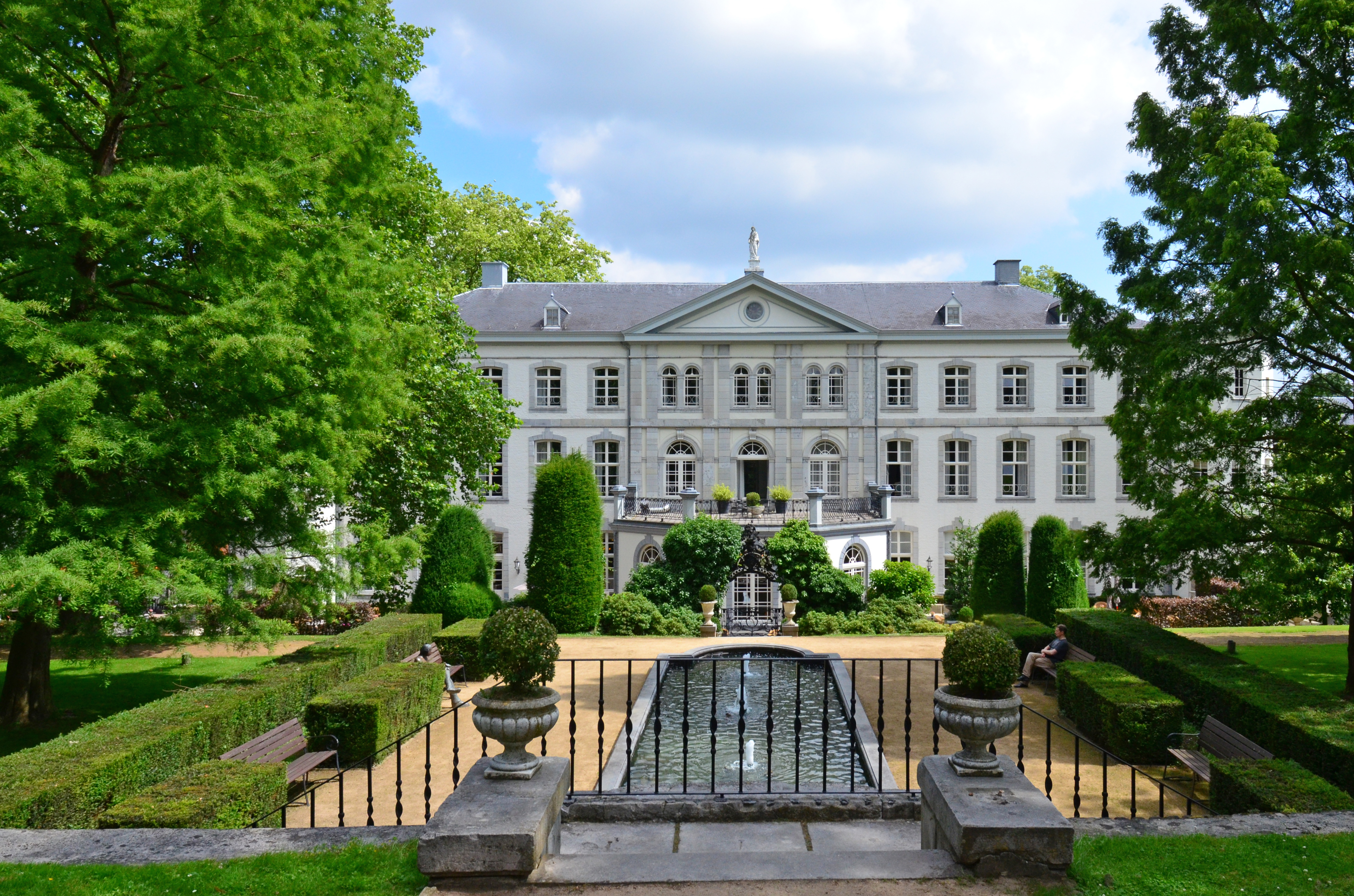 Gartenfassade des Schlosses Bloemendal in Vaals